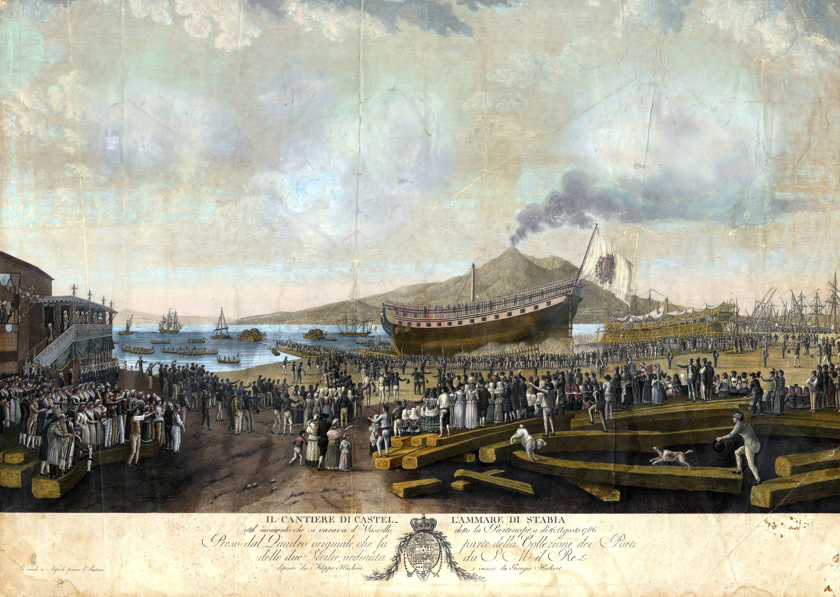 Varo del vascello Partenope in un quadro di Philipp Hackert